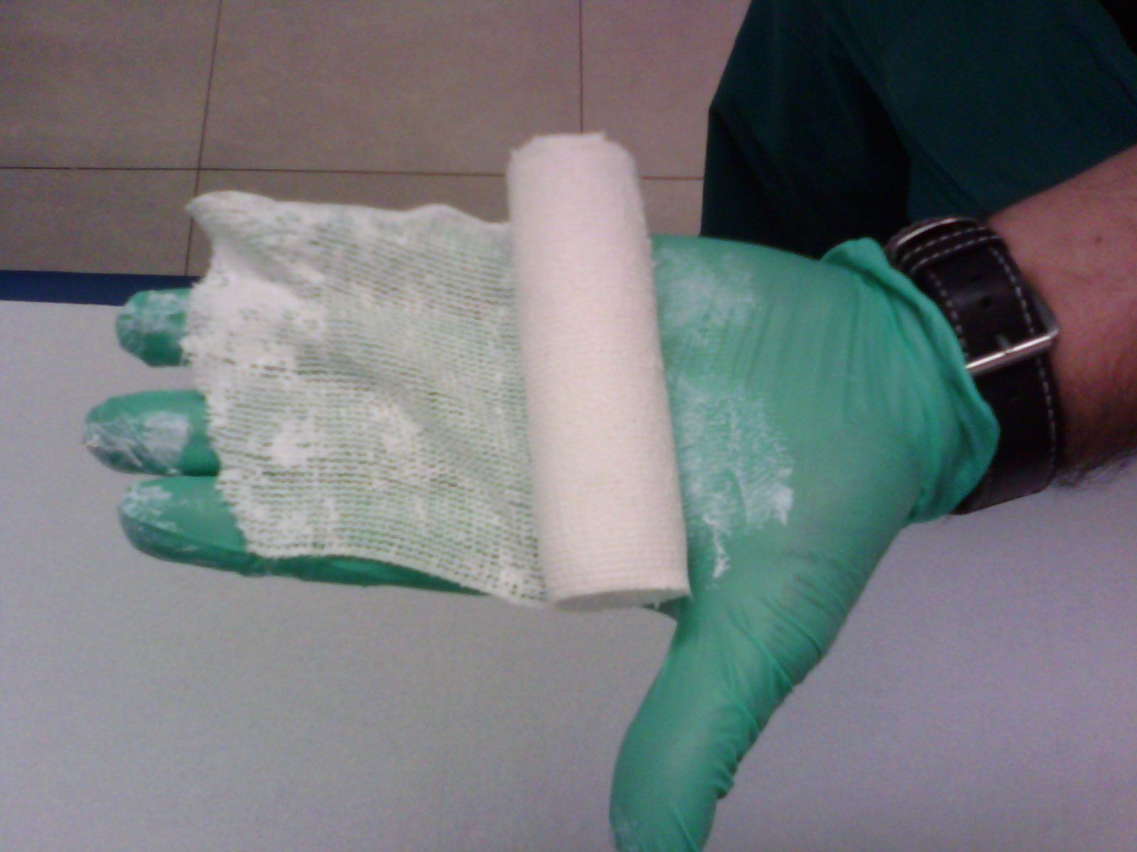 Esempio di benda alla colla di zinco.